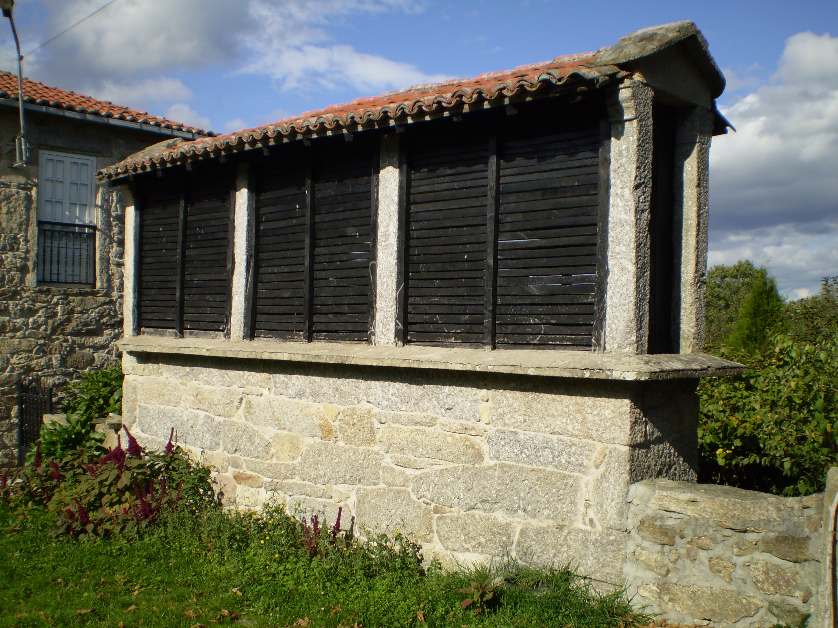 Hórreo en Montecelos (Antas de Ulla)